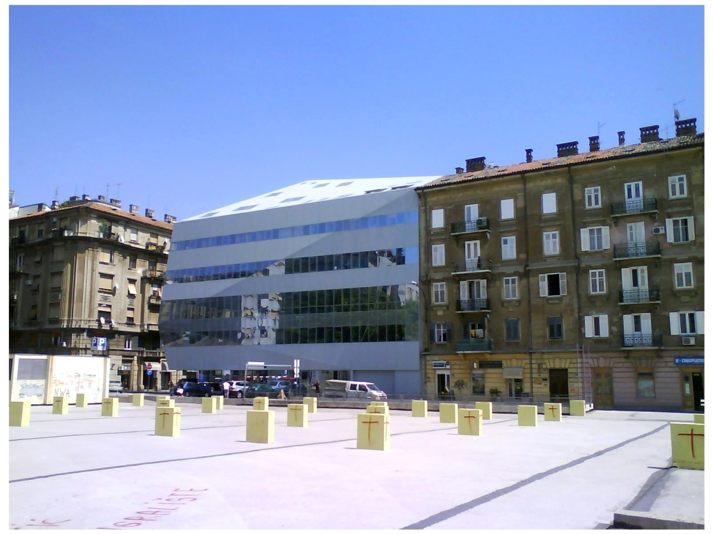 Pogled na Agatićevu ulicu s Trga Ivana Klobučarića